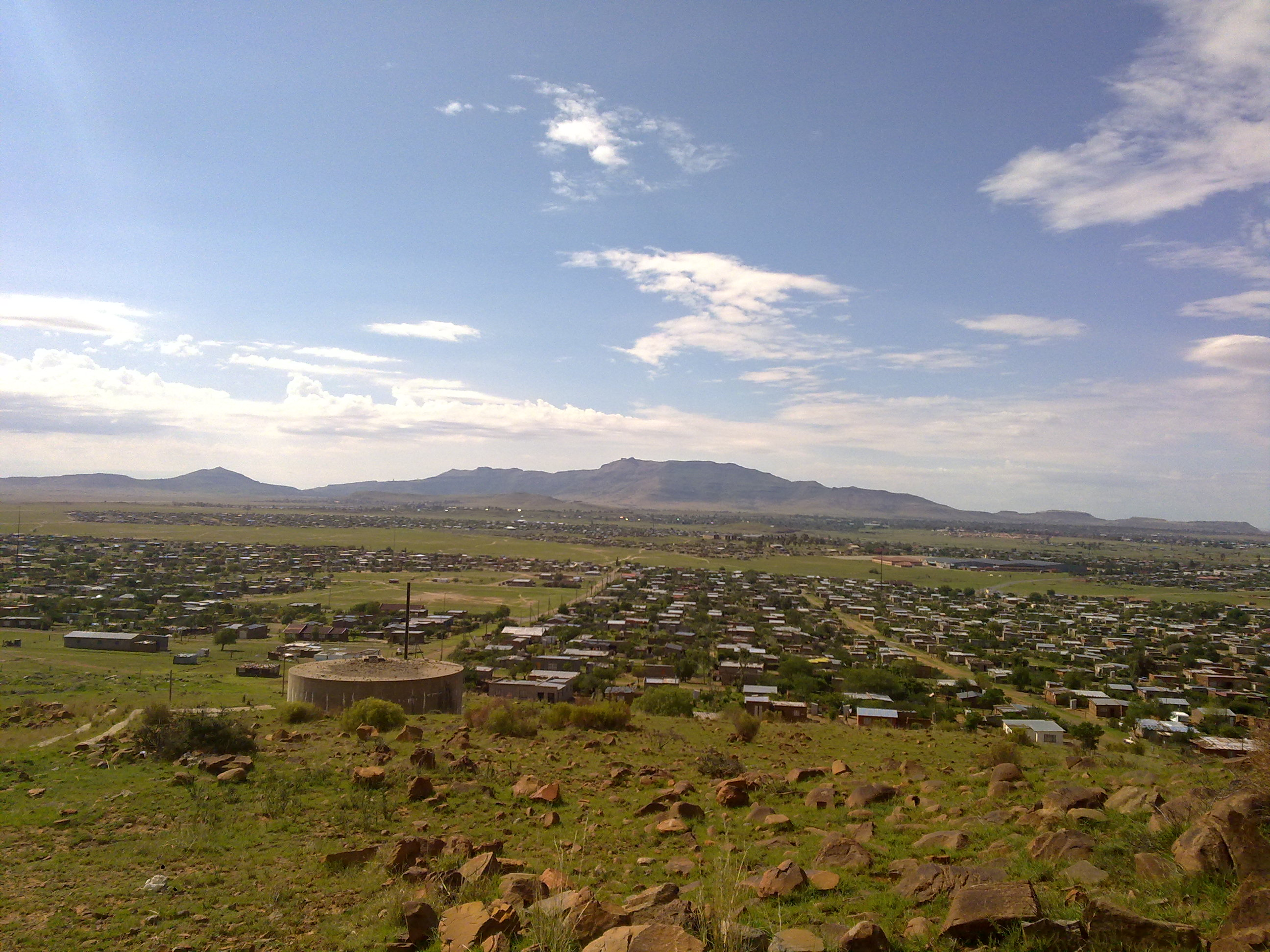 Thaba N'chu